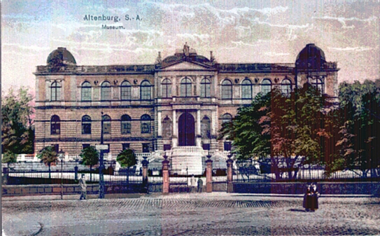 Old postcard of the Lindenau-Museum Altenburg, Germany from 1914